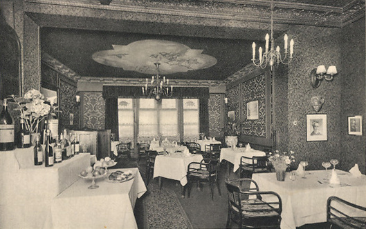 Restaurace "Zum schwarzen Ferkel", Berín, Dorotheenstraße 31. Dobová pohlednice..